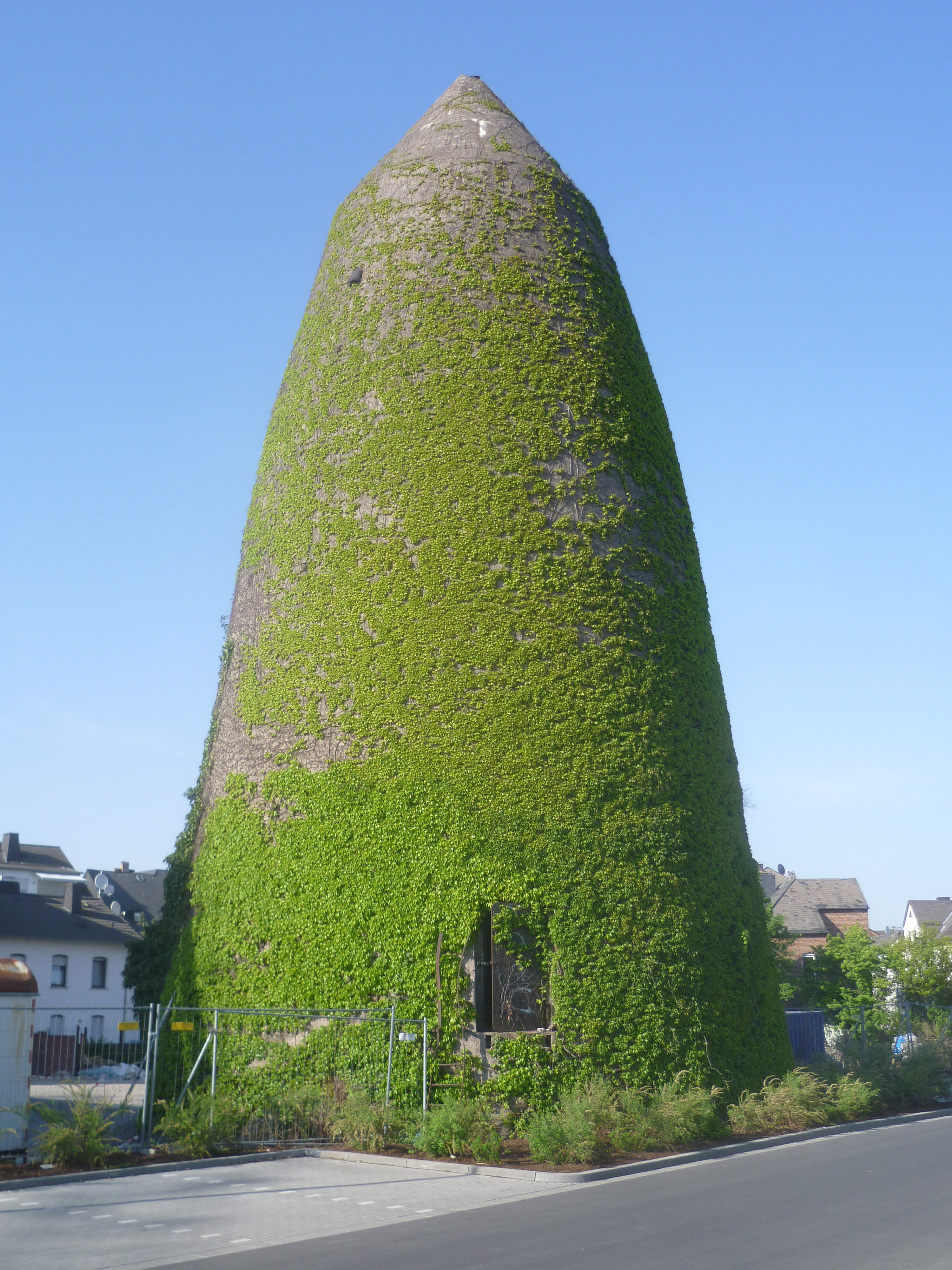 Der Winkel-Bunker in Limburg an der Lahn auf dem Gelände des Einkaufszentrums Werkstadt.